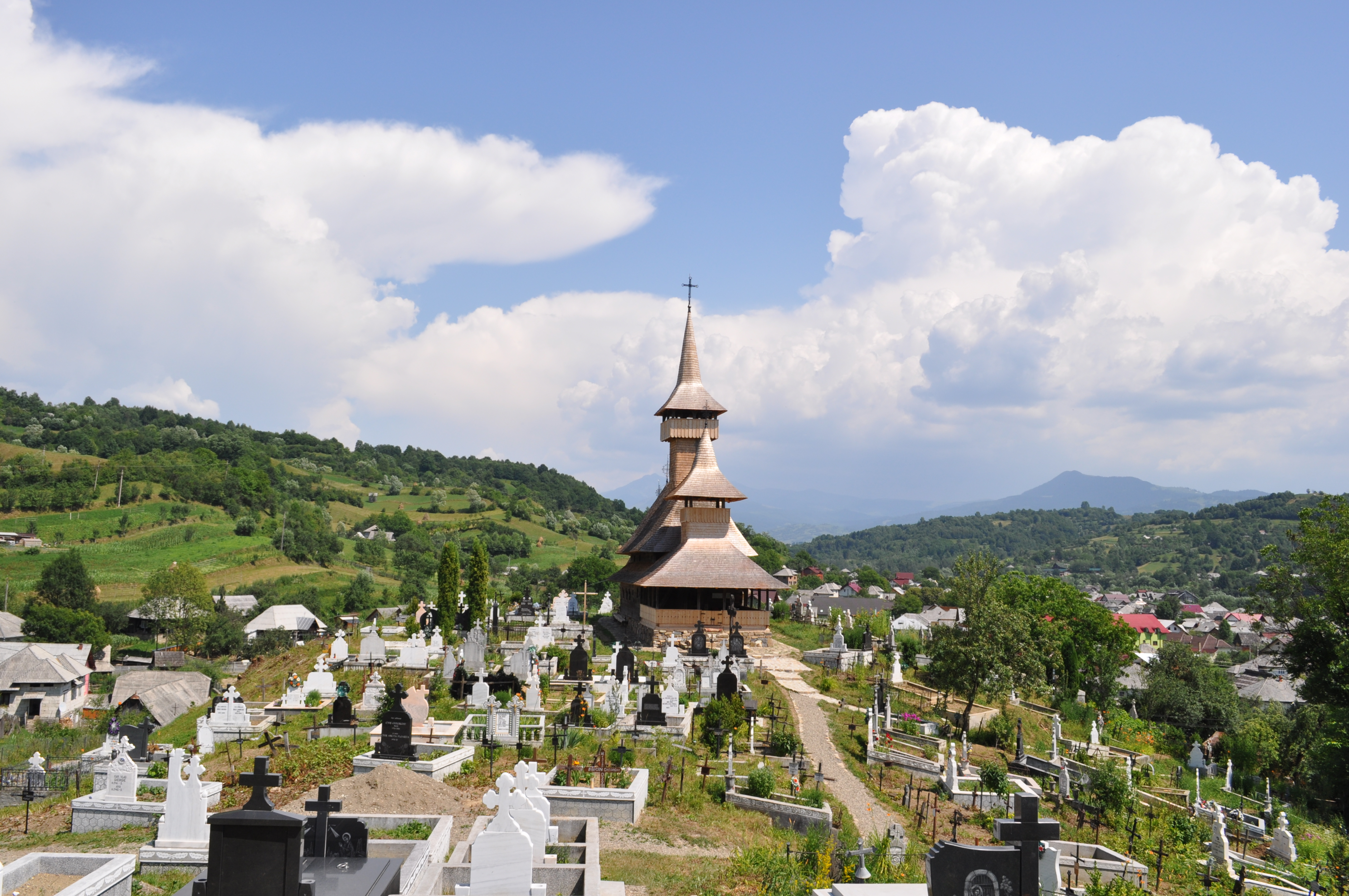 Biserica de lemn "Sfântul Nicolae" (a Nistoreştilor) , oraş SĂLIŞTEA DE SUS